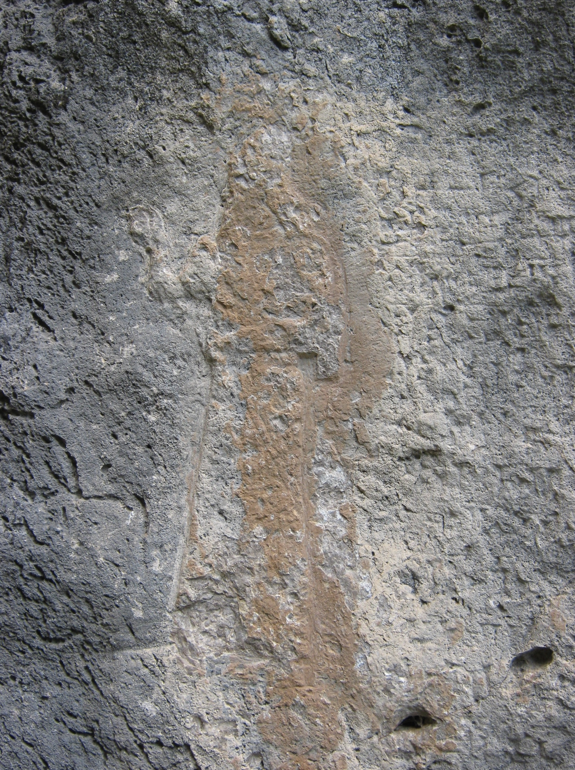 Relief Salmanassars III. in Höhle oberhalb des Ausgangs des Tigristunnels